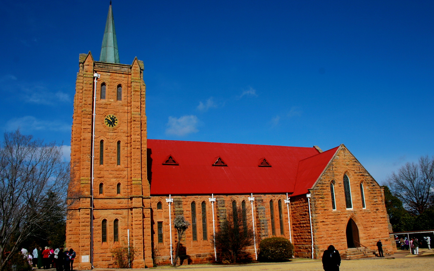 NG Kerk Church Fouriesburg